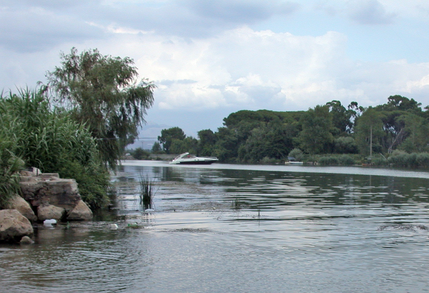 Fiume Garigliano, al confine tra Lazio e Campania, in Italia. Il fiume alla foce